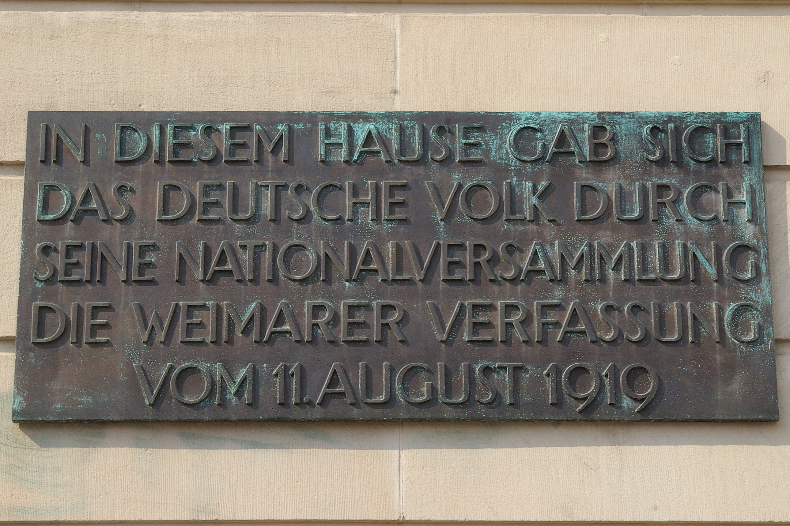 Tafel zur Weimarer Verfassung am Deutschen Nationaltheater in Weimar